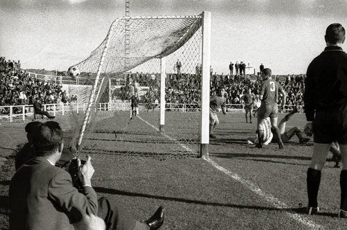 Gol de Arambarri gracias al cual la Real Sociedad ascendió a Primera División en 1967